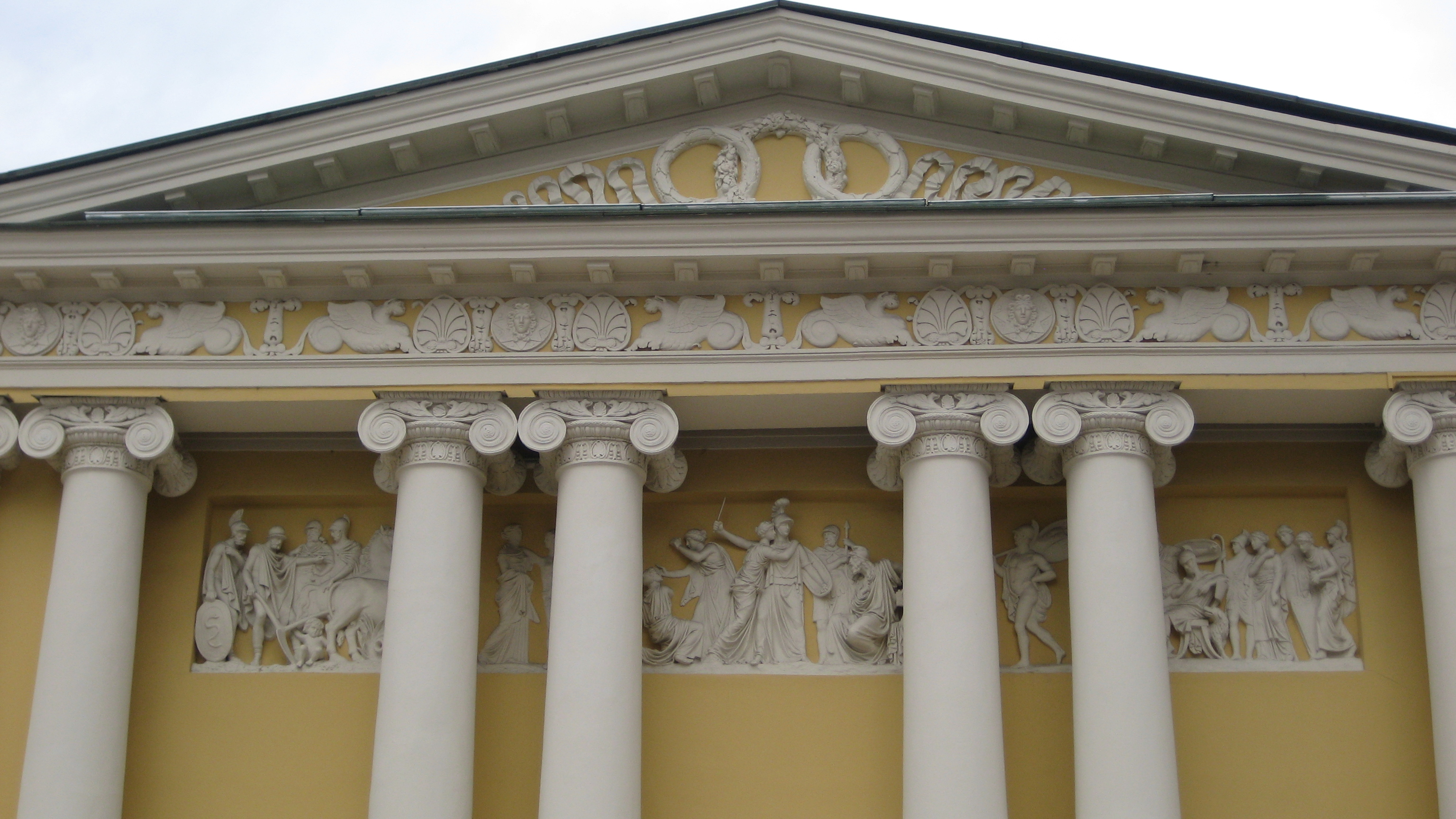 Alexander Pushkin's Museum (Prechistenka)